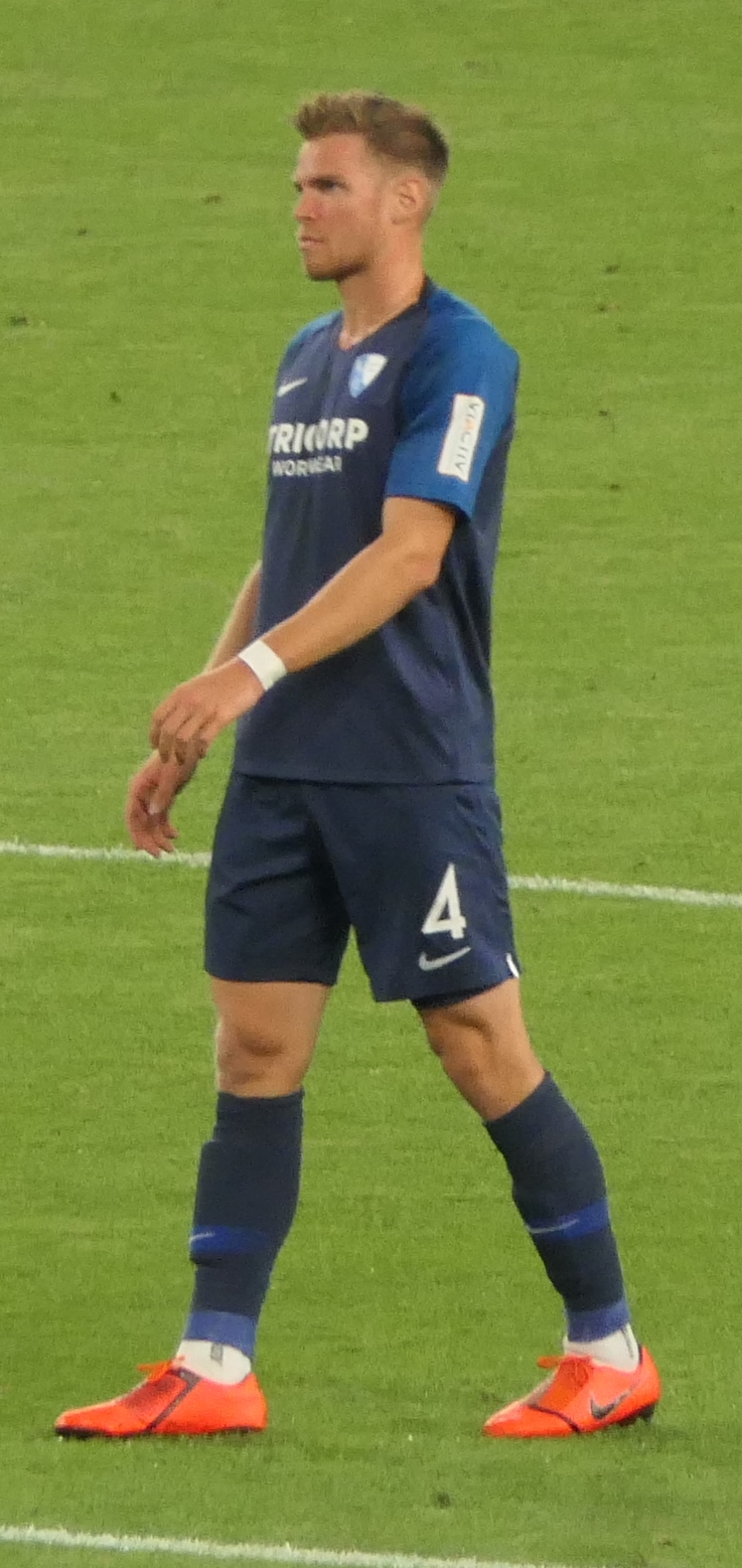 Der Fussballprofi Simon Lorenz im Trikot vom VfL Bochum beim Auswärtsspiel gegen den VfB Stuttgart am 02.09.2019.